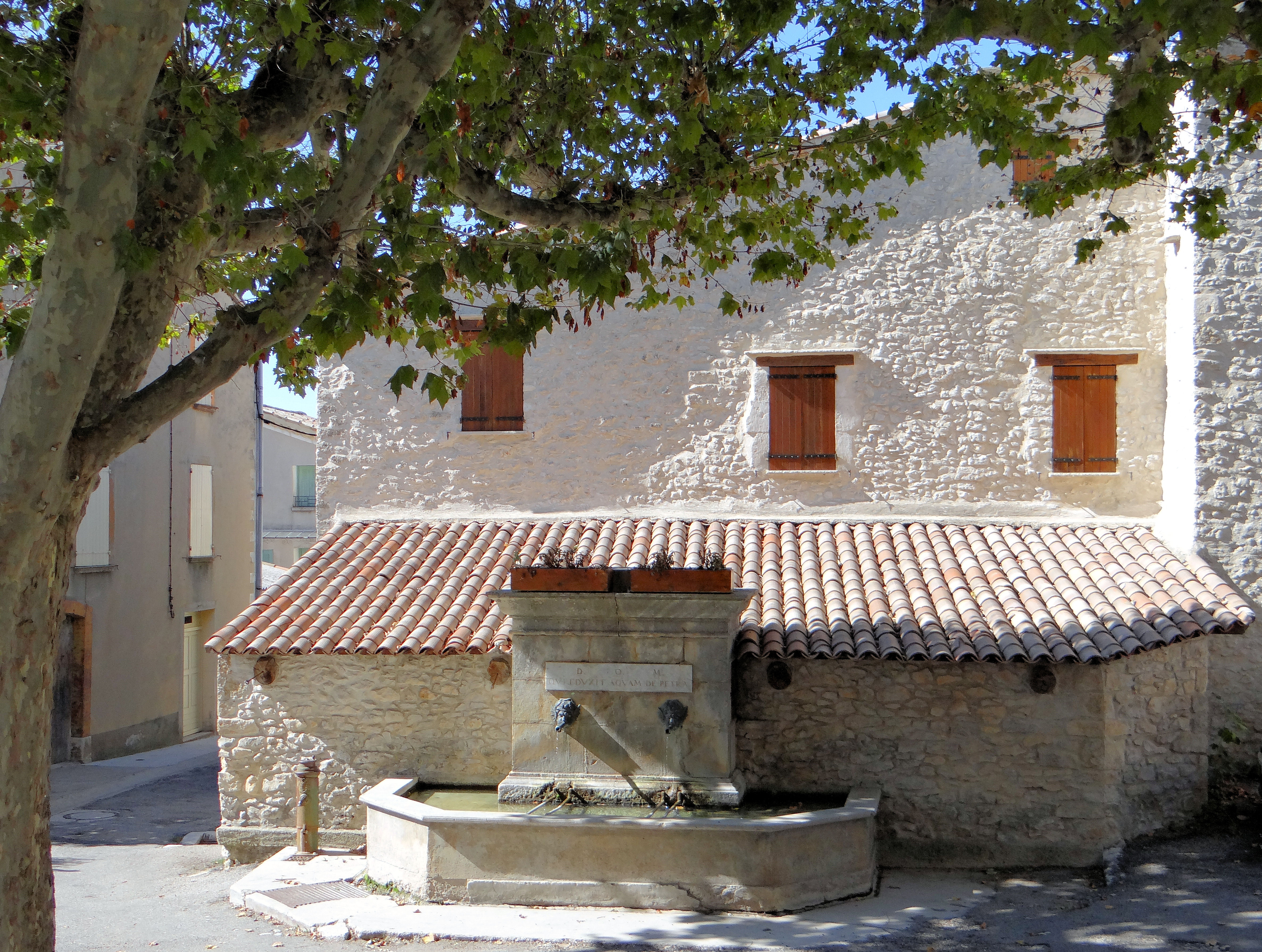 Revest-du-Bion - Une fontaine